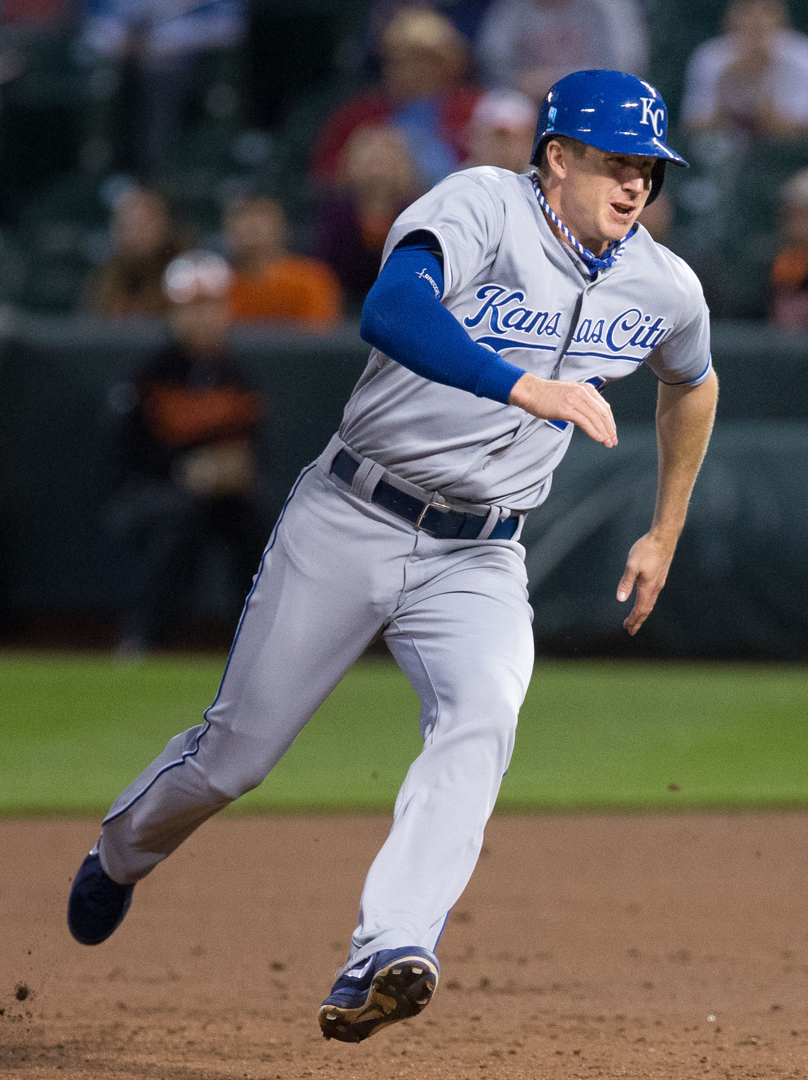 Elliot Johnson